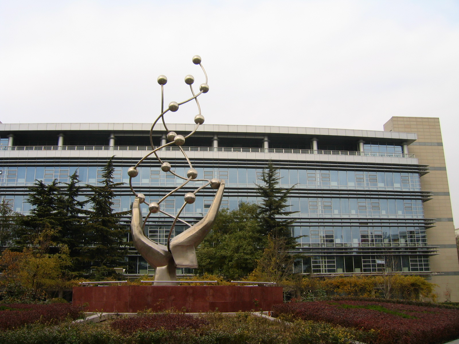 北京化工大学母校之光和逸夫图书馆。